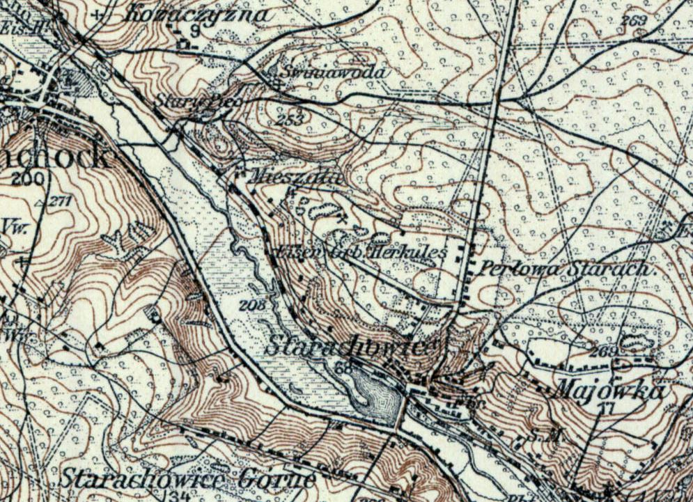 Herkules Kopalnia mapa